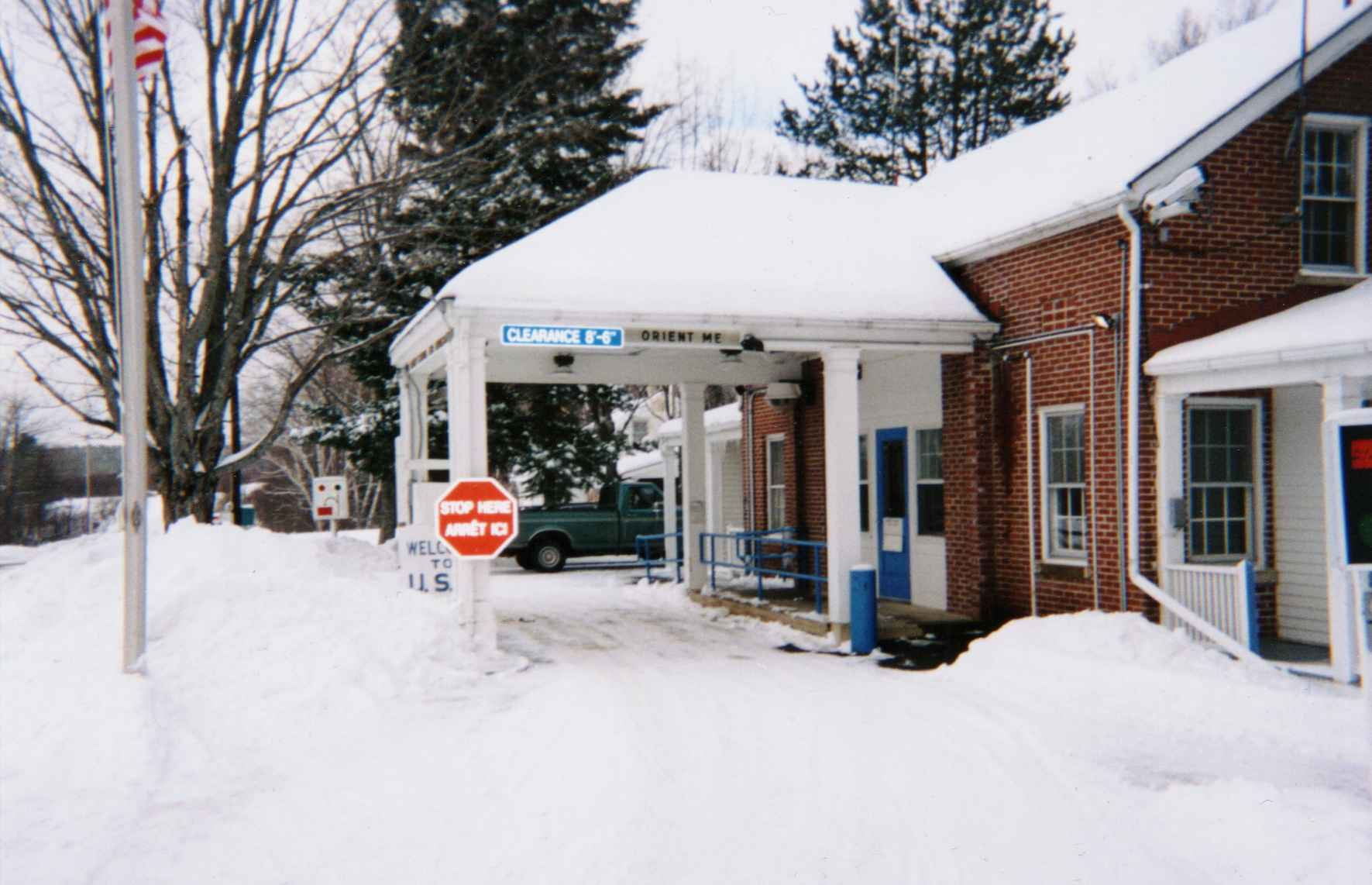 Orient Maine Border Station